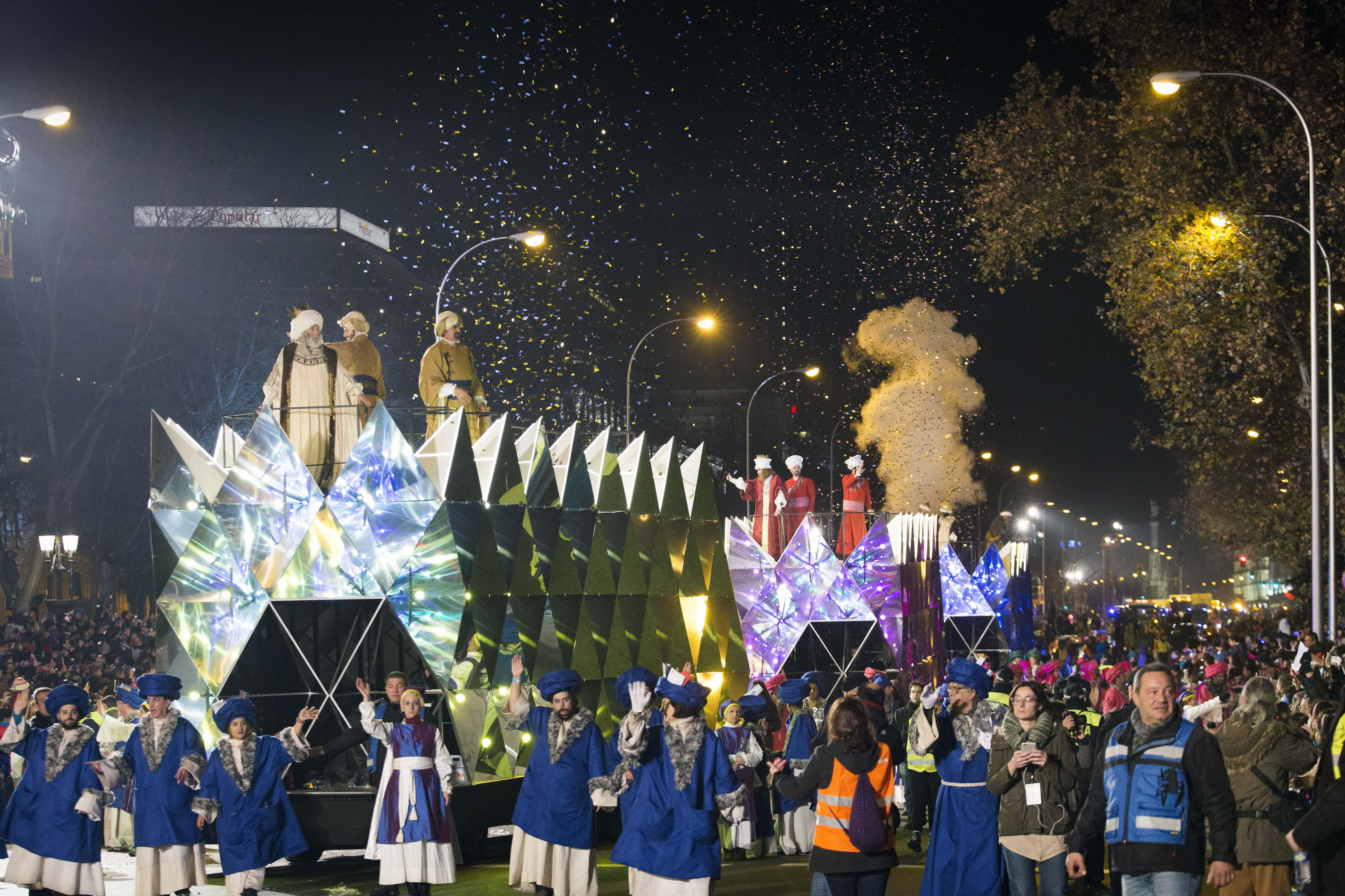 Esta semana, la llegada de los Reyes Magos a Madrid marca la agenda cultural y lúdica de la ciudad. Además de la cabalgata central, que recorre la tarde del 5 de enero los paseos de La Castellana y de Recoletos para concluir en la Plaza de Cibeles, se han organizado otras 17 comitivas de Reyes, que llevarán la magia de esta tradición a 15 distritos periféricos. La Plaza Mayor sigue siendo epicentro cultural de Madrid también en Navidad, con conciertos desde los balcones de la Casa de la Panadería. La actuación de conjuntos corales de los distritos en CentroCentro, un singular teatro de títeres hechos con hologramas en Conde Duque, la posibilidad de ver clásicos del cine en pantalla grande en Cineteca o un peculiar concierto de flauta de pico acompañado de proyecciones y escenografía en CentroCentro son otras de las opciones para disfrutar de los últimos días de la Navidad.